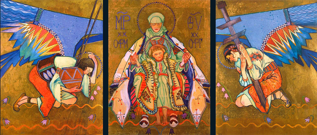 Казимир Сіхульський триптих "Гуцульська мадонна"